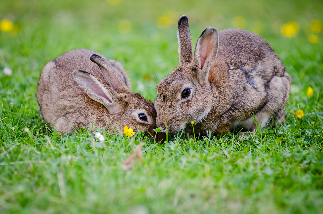 European rabbits Oryctolagus cuniculus